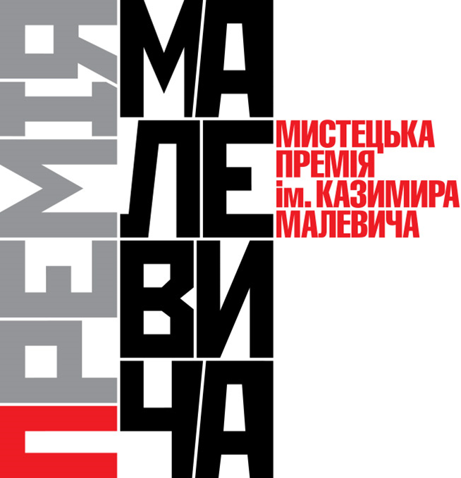 logo nagrody Malewicza, którą zainicjował Instytut Polski w Kijowie w 2008 roku